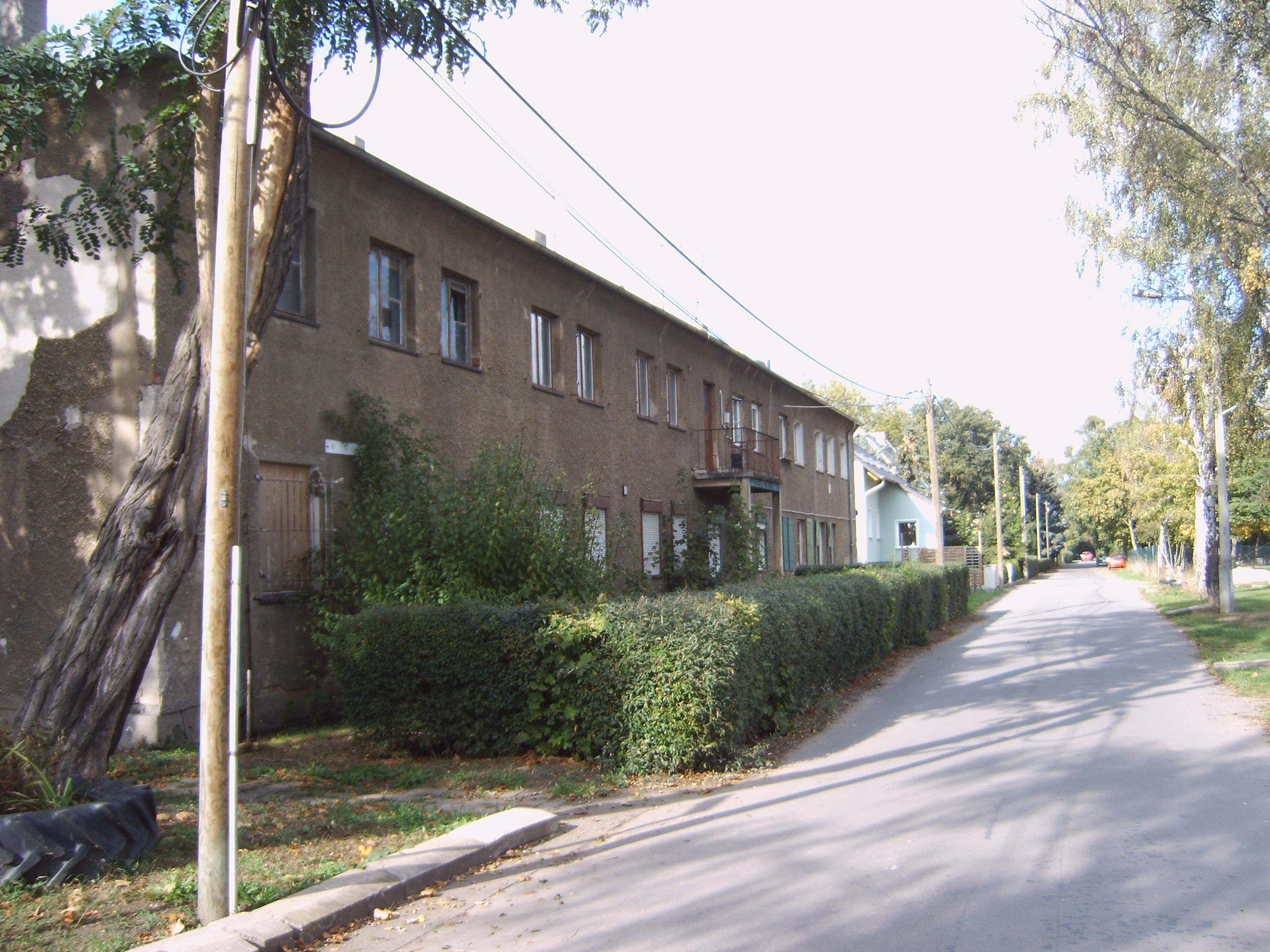 Straße Zum Waldsee, Friedensweiler, Magdeburg, Deutschland